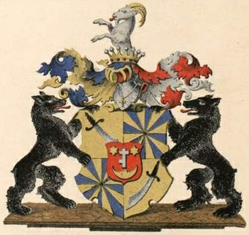 Bielsky suguvõsa vabahärravapp